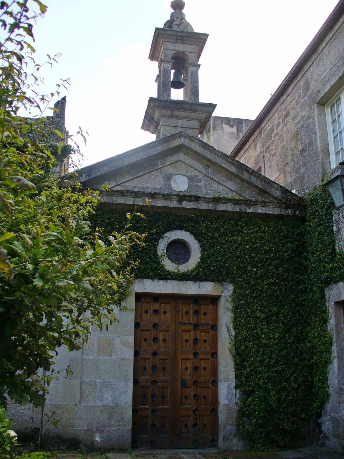 Kapelo en la Palaco Quiñones de León, Vigo, Galegio